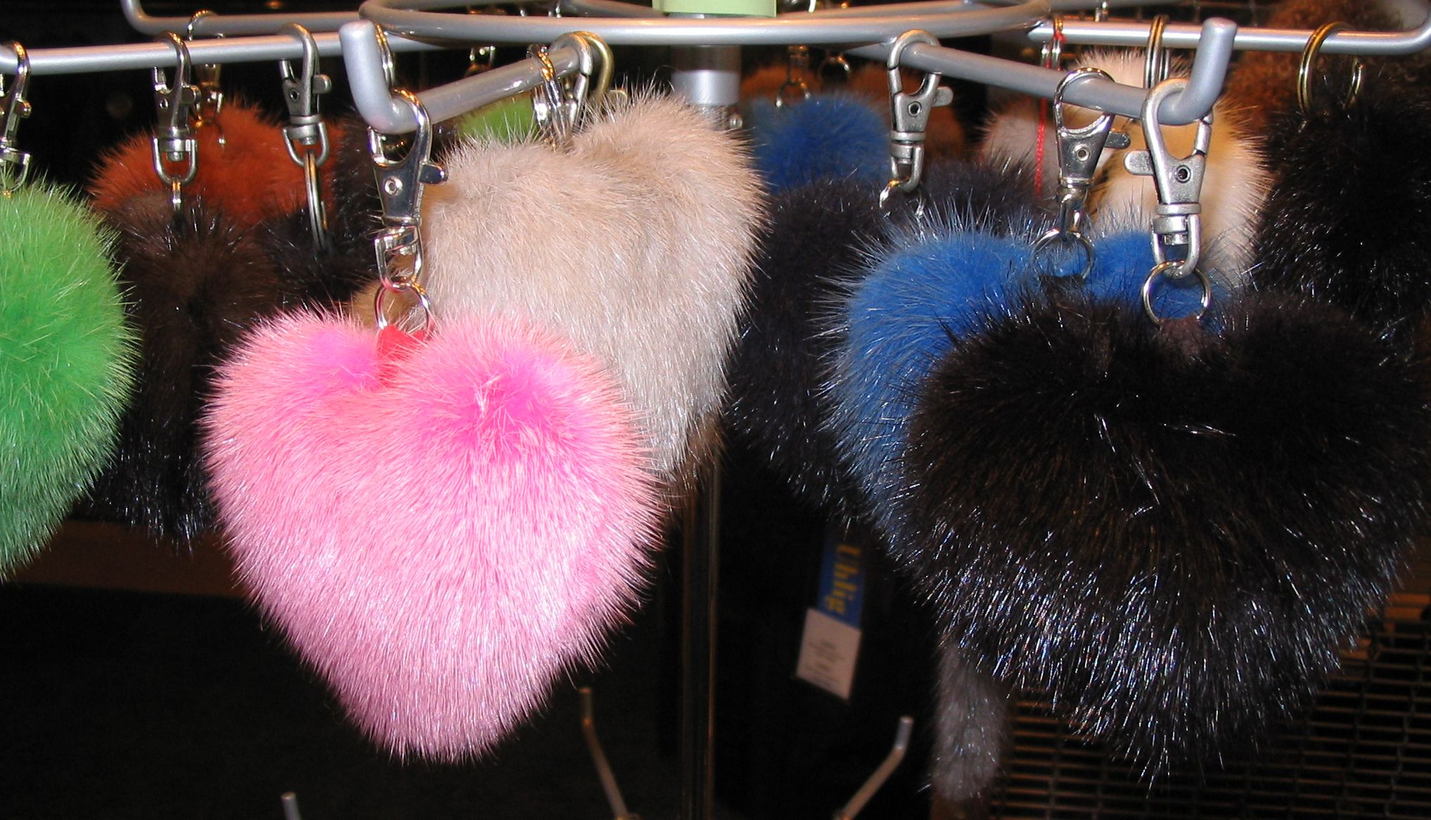 Herzanhänger aus gefärbtem Nerzfell. Gesehen bei Firma CHR. SCHAD PELZ UND LEDER, Ludwigshafen